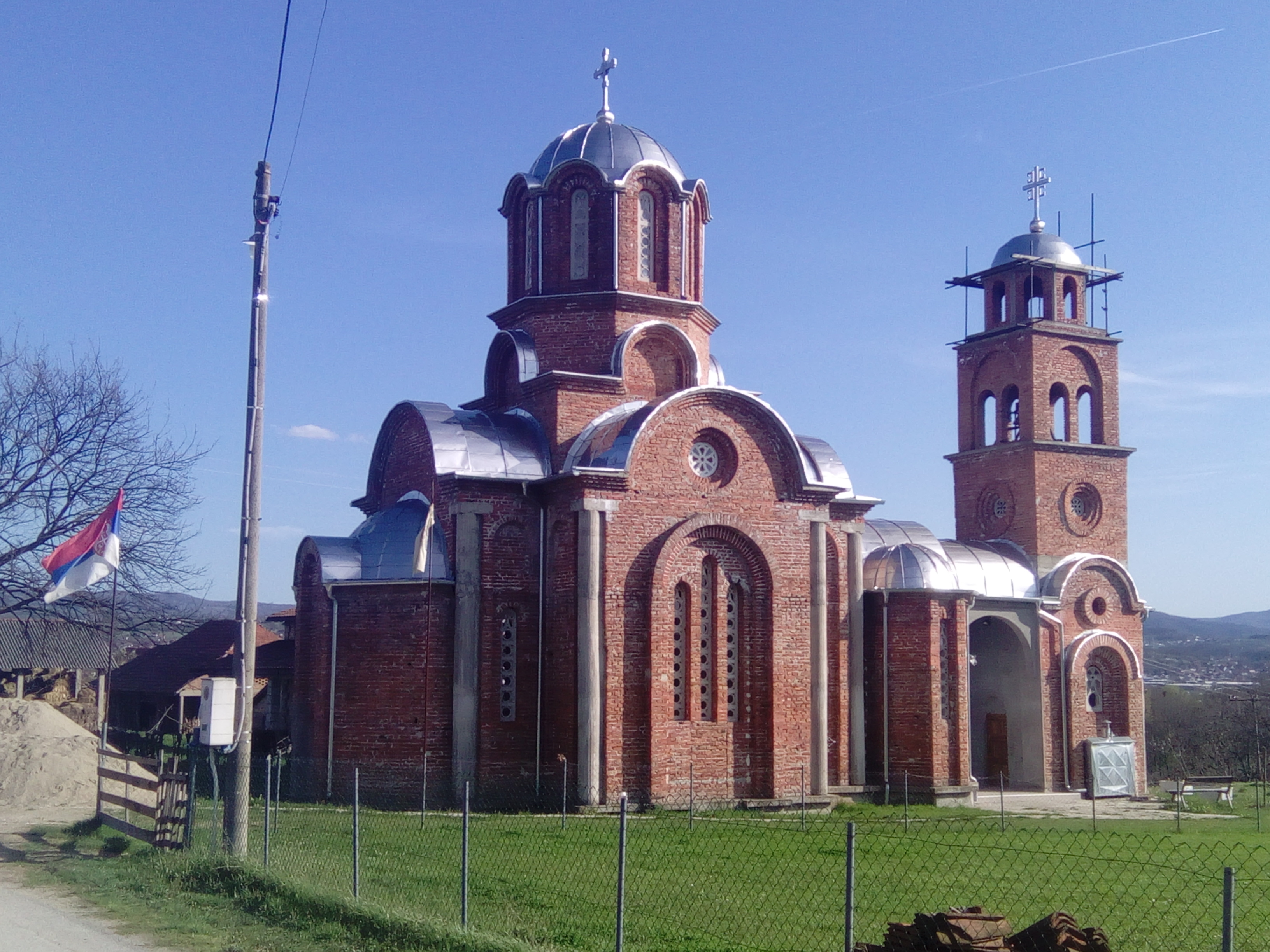 Srpski (latinica): Crkva u Jovanovcu u izgradnji